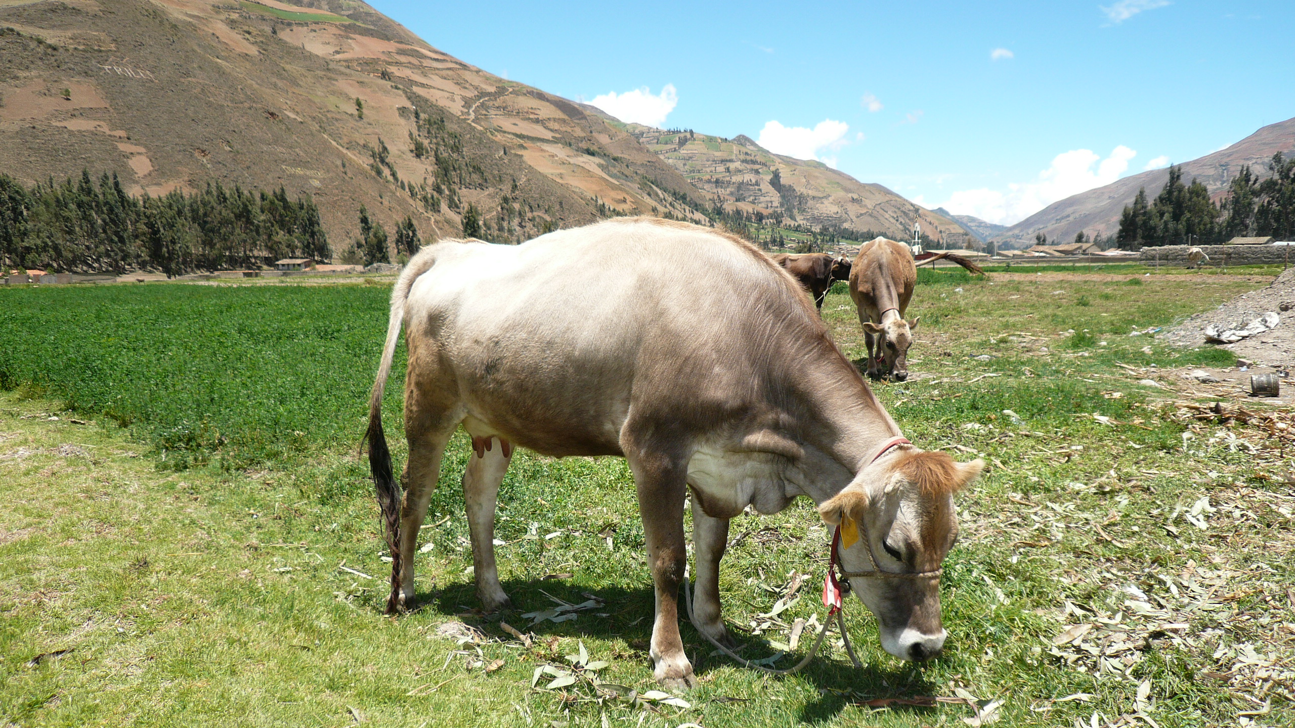 Ganado vacuno alrededor de la ciudad de Pampas.